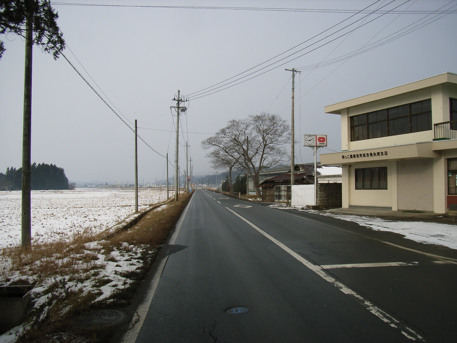 Miyagi Prefectural Road 4, Nakada-Kurikoma Line. Kurihara, Miyagi prefecture, Japan.